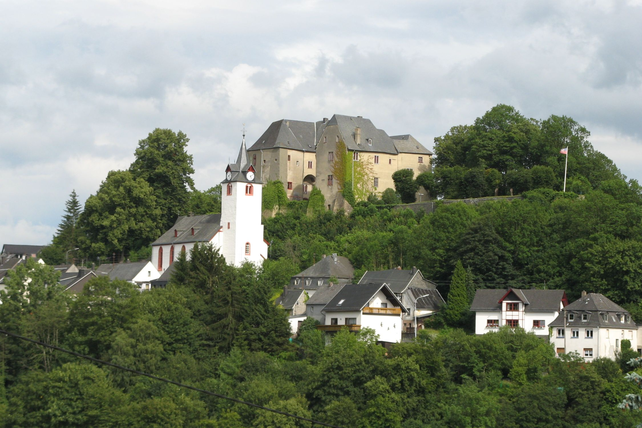 Schlossberg in Westerburg mit ev. Kirche und Schloss